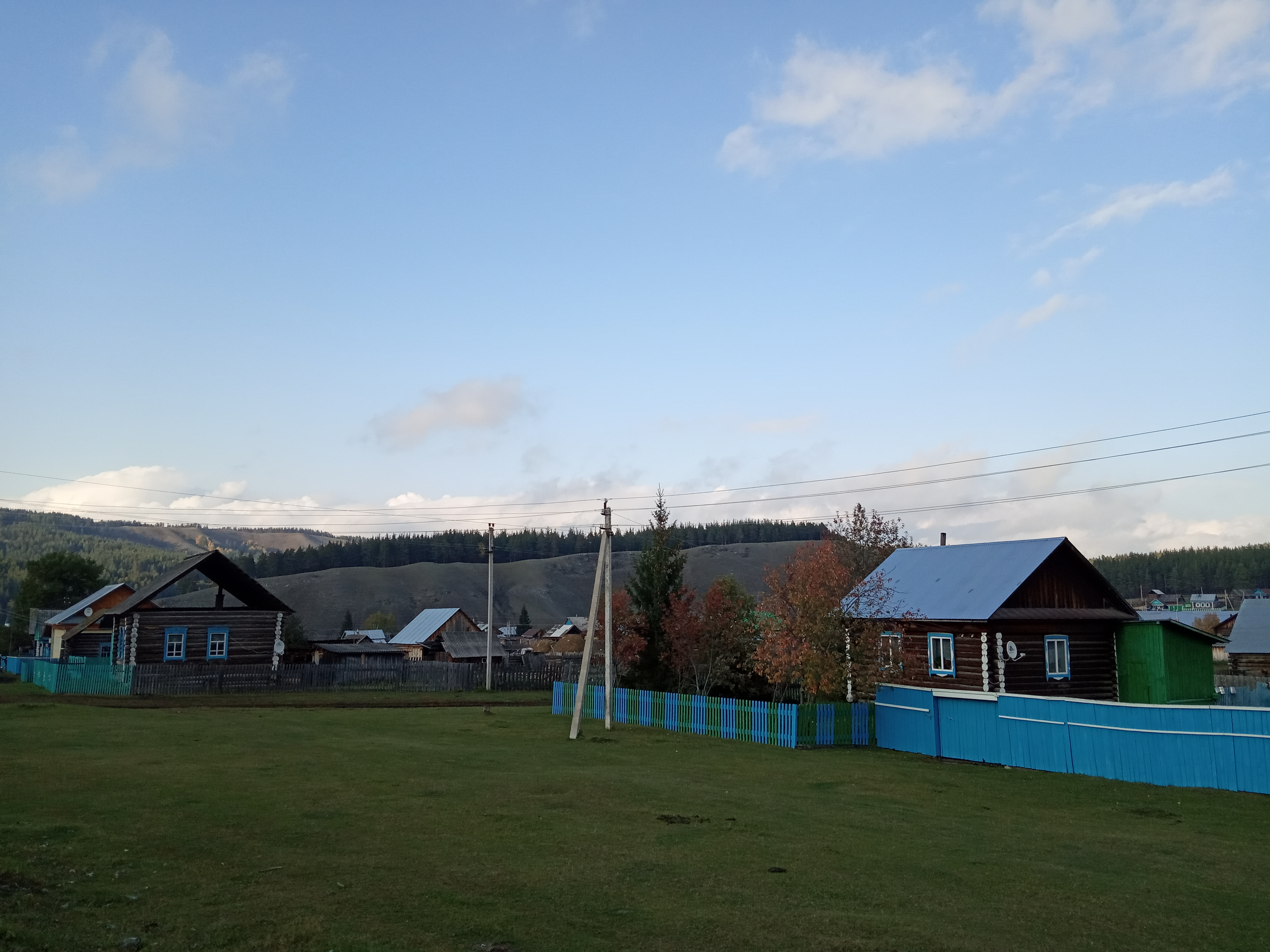 Бурзянский район, дер.Яумбаево.Деревенская улица.